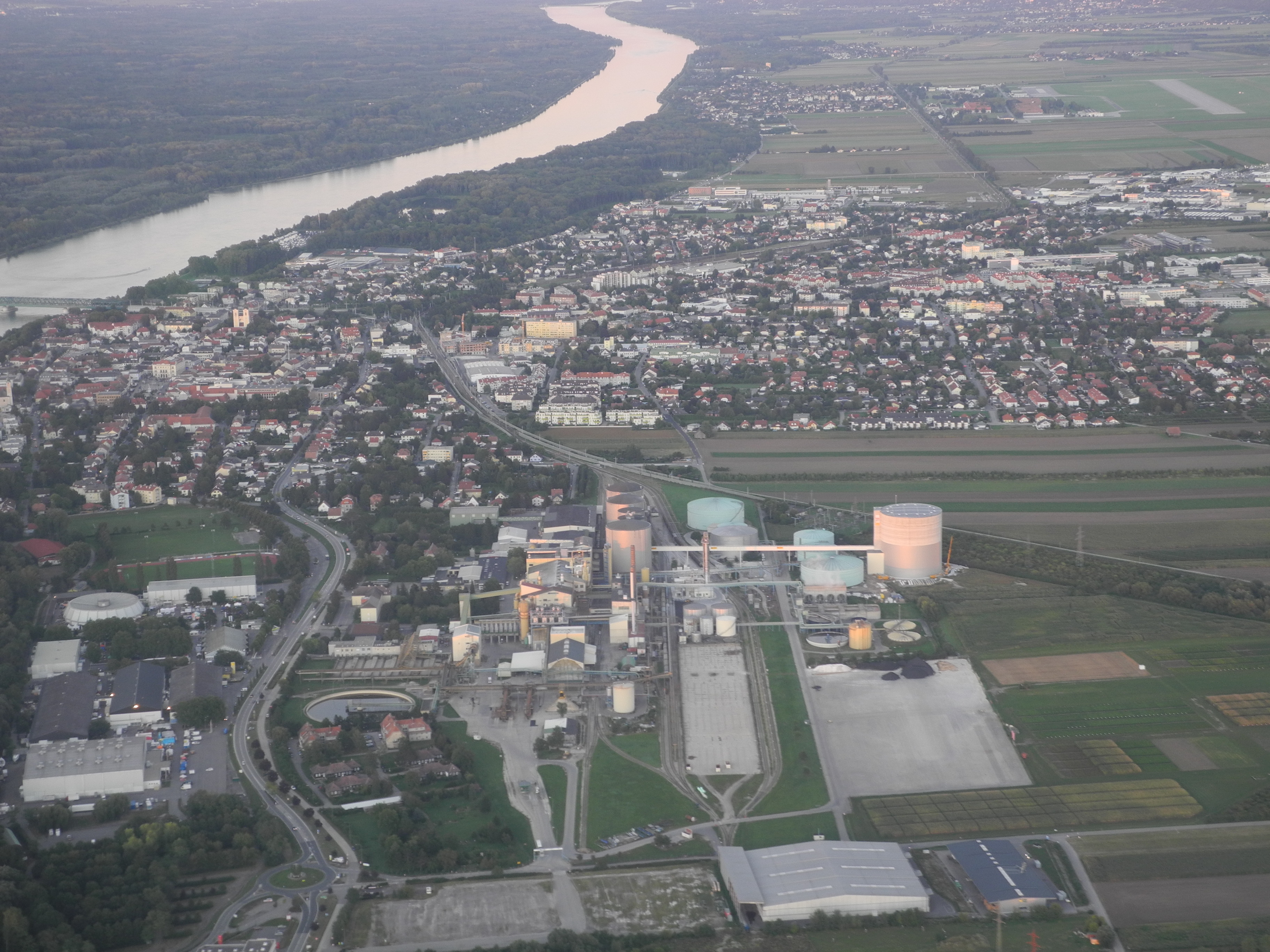 Luftbild von Tulln an der Donau